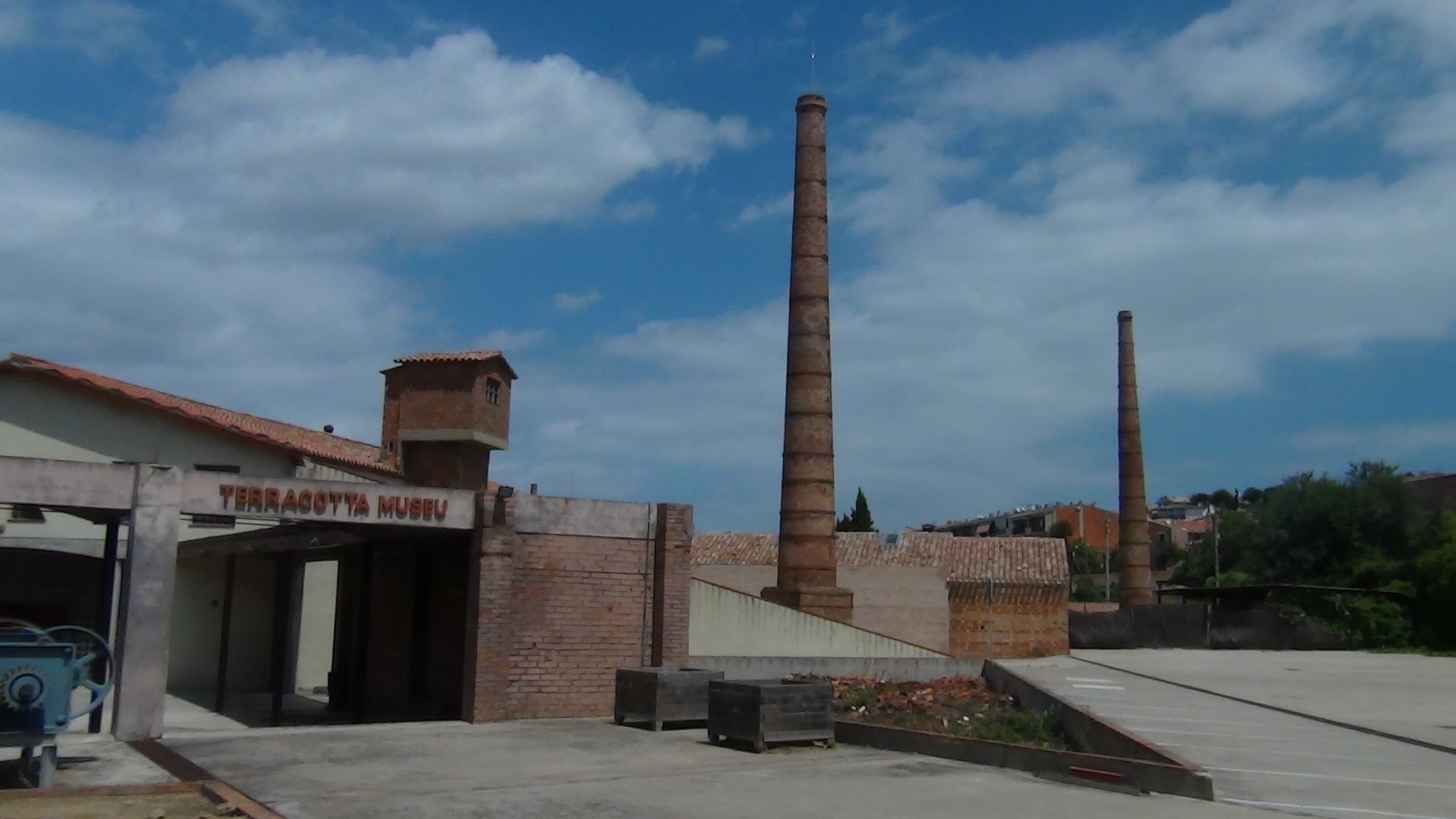 Xemeneia Terracotta de la Bisbal d'Empordà